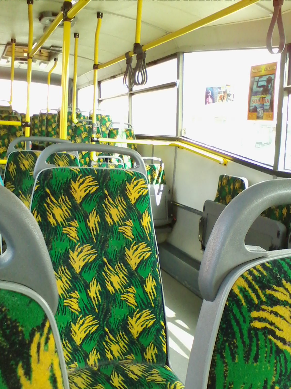 INTERIER AUTOBUSU MHD CHEB.